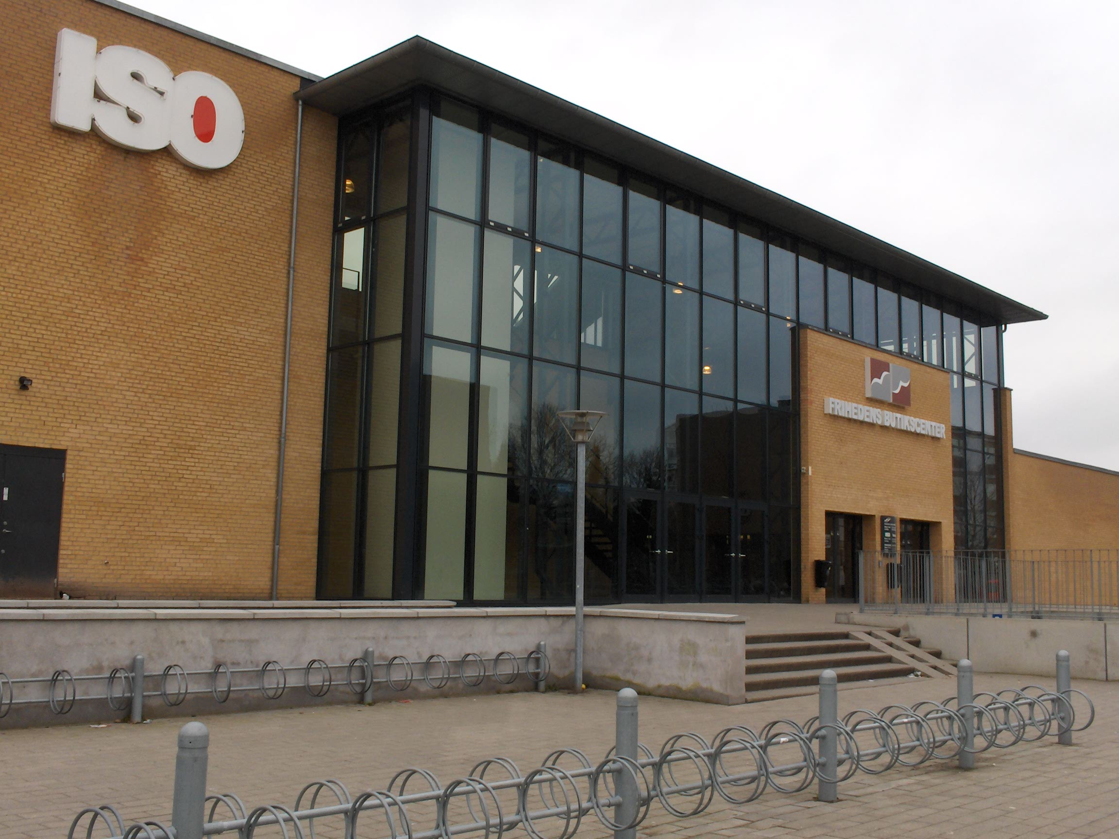 Frihedens Butikscenter, Hvidovre Kommune, med supermarkedskæden ISO, der nu er overtaget af Superbest.